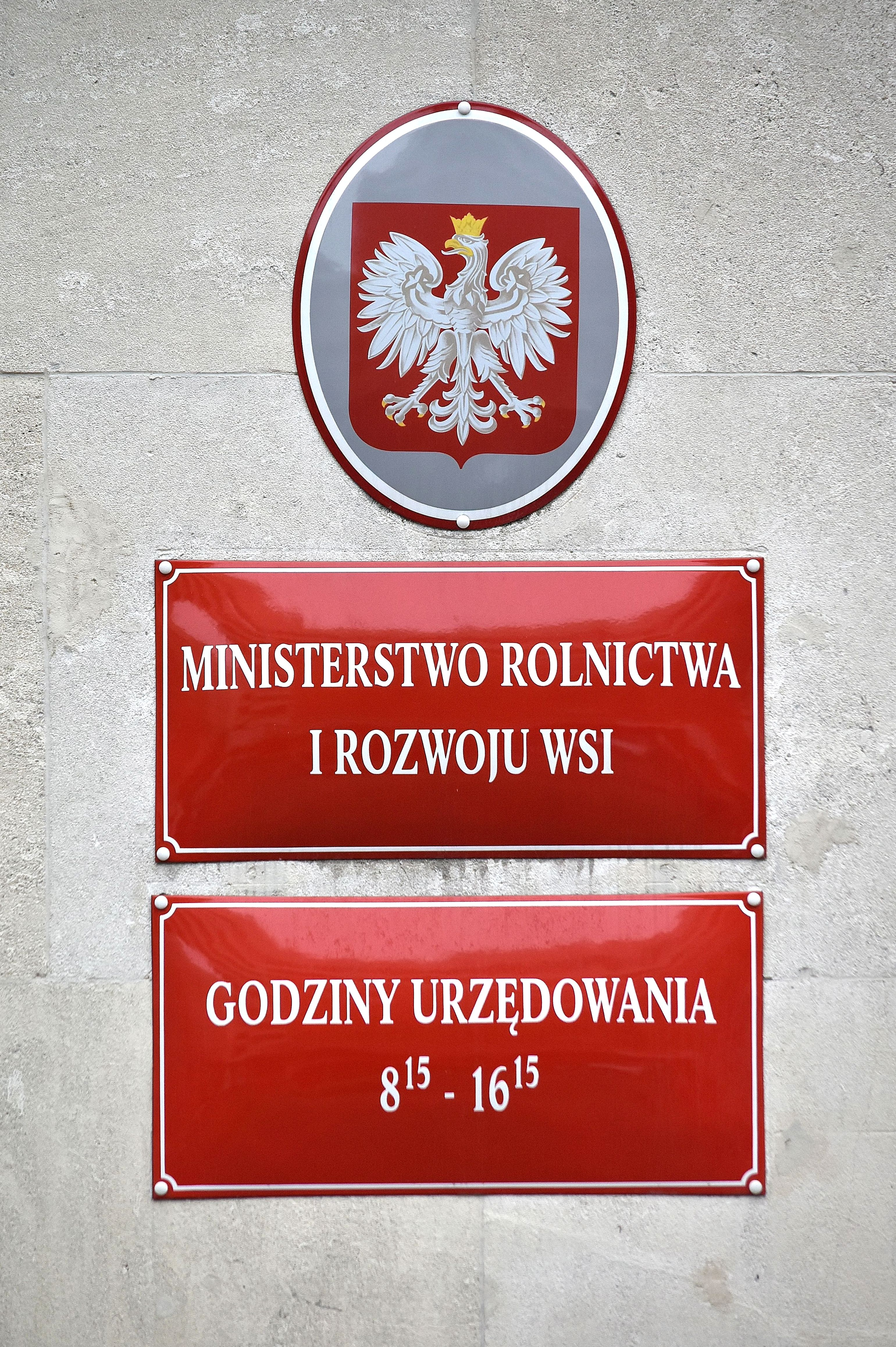 Tablice przy wejściu do budynku Ministerstwo Rolnictwa i Rozwoju Wsi przy ul. Wspólnej 30 w Warszawie